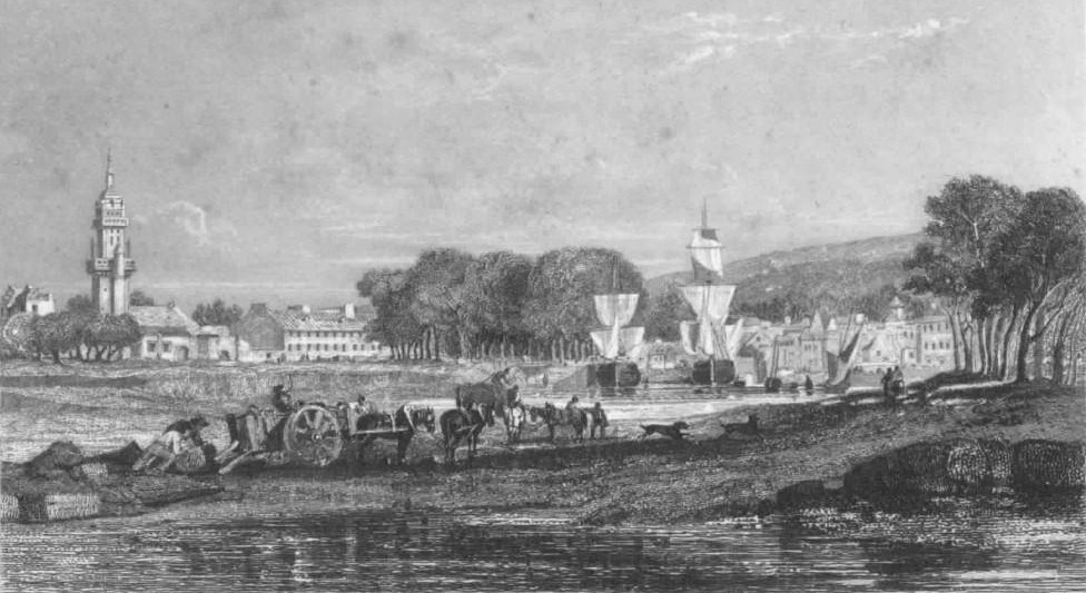 Landerneau en 1844 (dessin de Jules Noël dans "La Bretagne" par Jules Janin, 1844